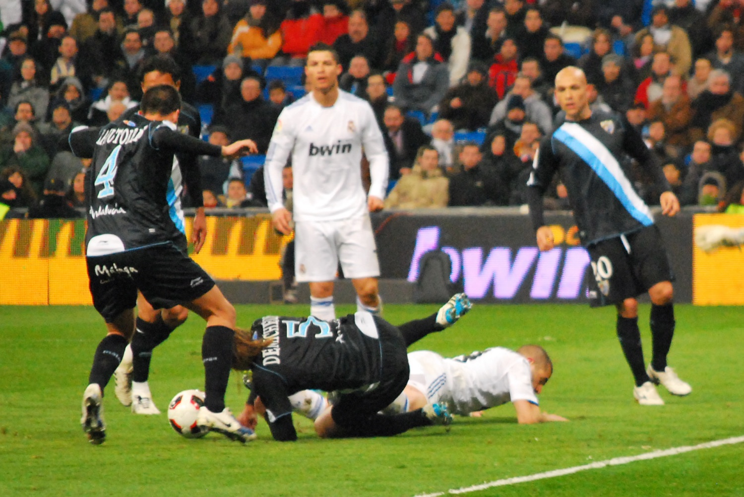 Benzema al suelo